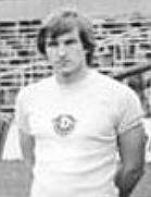 Title: Fußballmannschaft SG Dynamo Dresden Factual corrections and alternative descriptions are encouraged separately from the original description. Additionally errors can be reported at this page to inform the Bundesarchiv. Original historic description: ADN-ZB-Häßler-15.5.76-Dresden: SG Dynamo Dresden DDR-Fußballmeister 1976. Sie erkämpften den Meistertitel: (stehend von links) Hans-Jürgen Dörner, Klaus Lichtenberger, Udo Schmuck, Hans-Jürgen Kreische, Franz Ganzera, Hartmut Schade, Gerd Weber, Siegmar Wätzlich, Klaus Müller, (vorn von links) Christian Heim, Reinhard Häfner, Peter Kotte, Frank Richter, Torwart Klaus Boden, Rainer Sachse, Matthias Müller, Gert Heidler und Dieter Riedel.